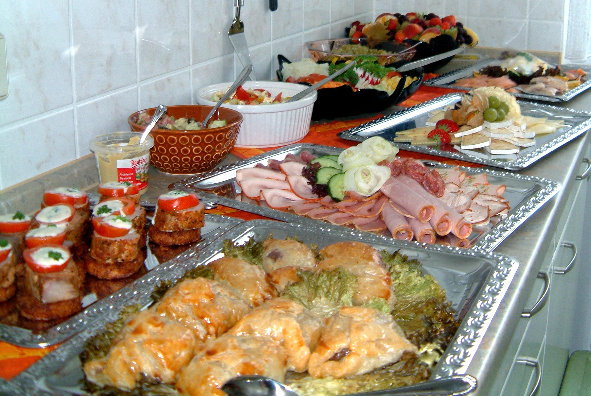 To_gorge_oneself_-_das_große_Fressen_Juli_2002